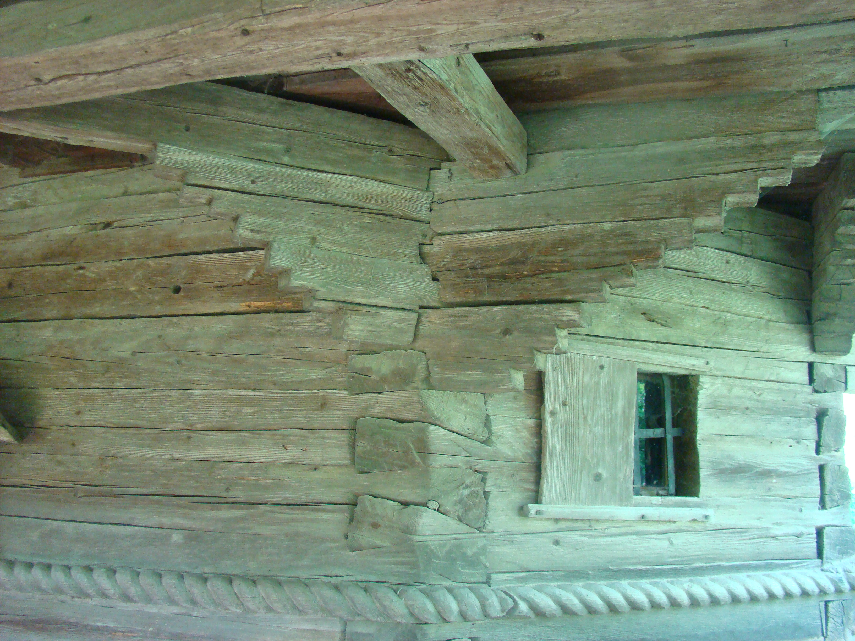 Biserica de lemn „Sfinții Arhangheli” din Băița, Mureș